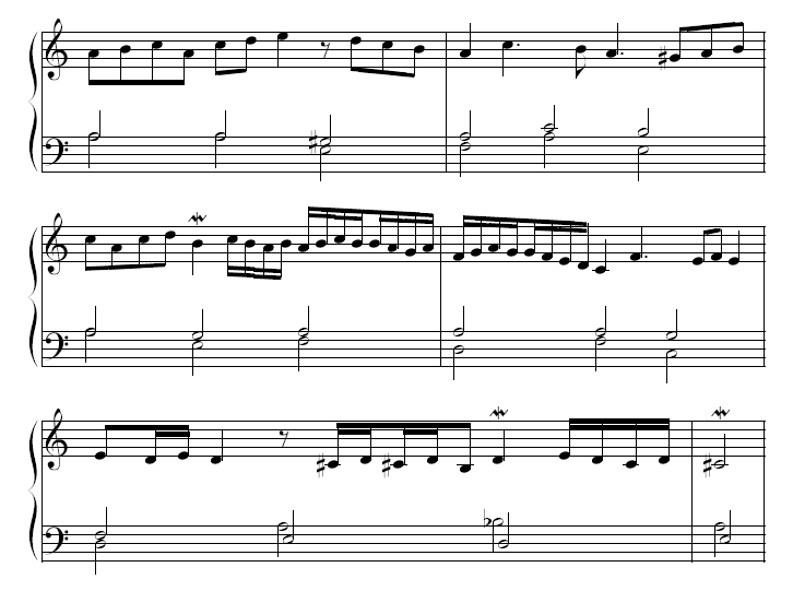 Extrait de la partition du folio 242.